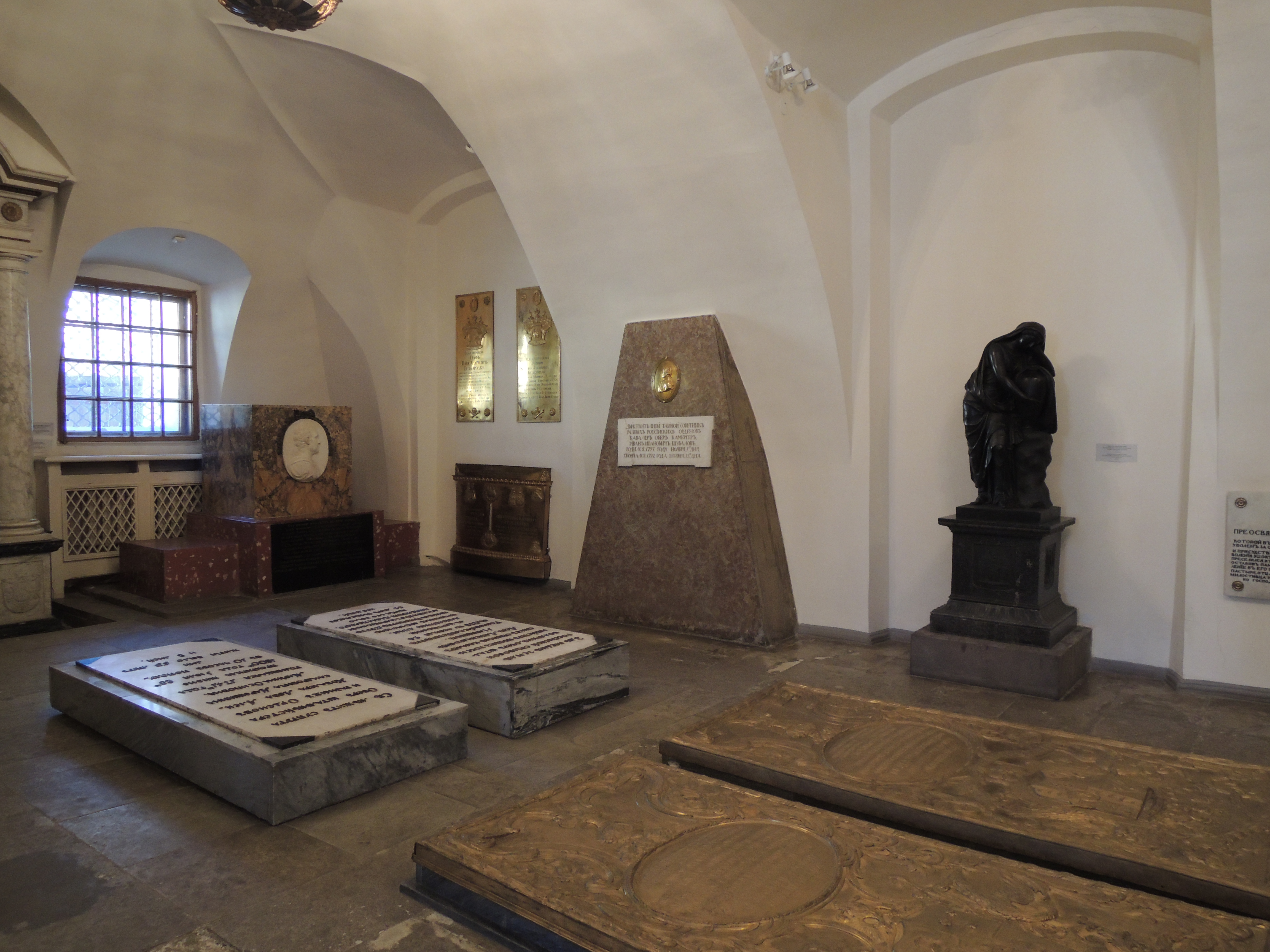 Благовещенская церковь Александро-Невской лавры